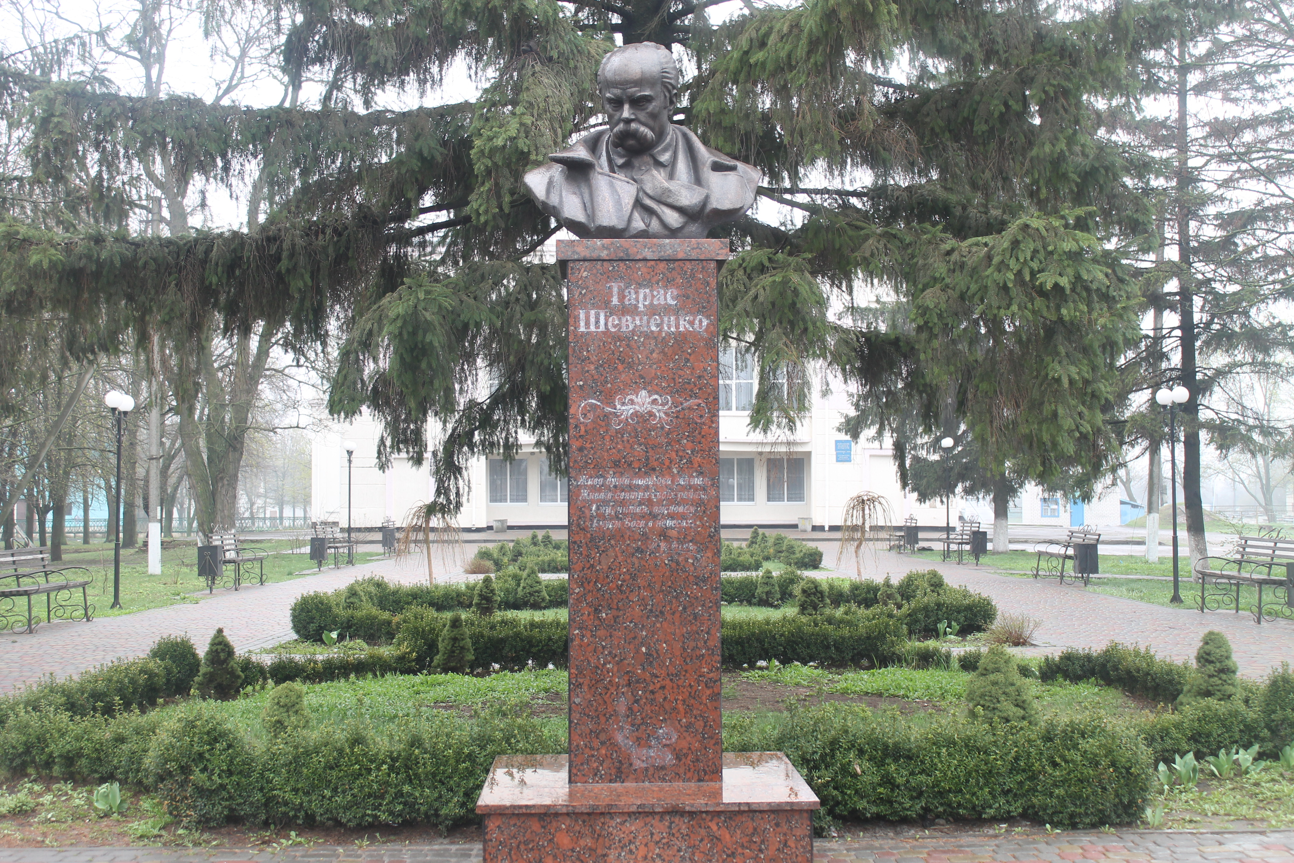 Т. Г. Шевченко